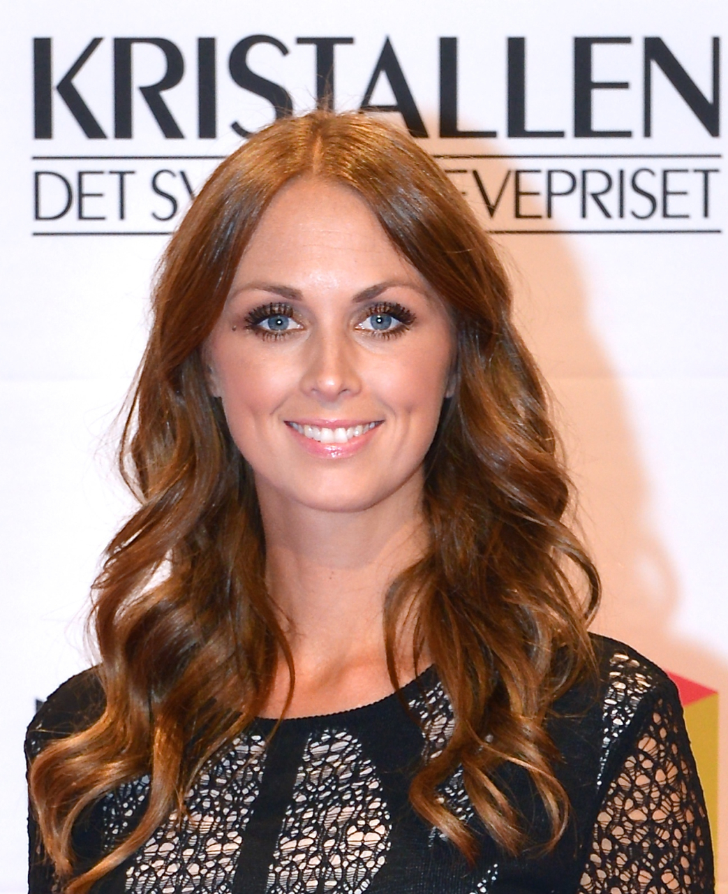 Karin Frick på Kristallen-galan den 30 augusti 2013.